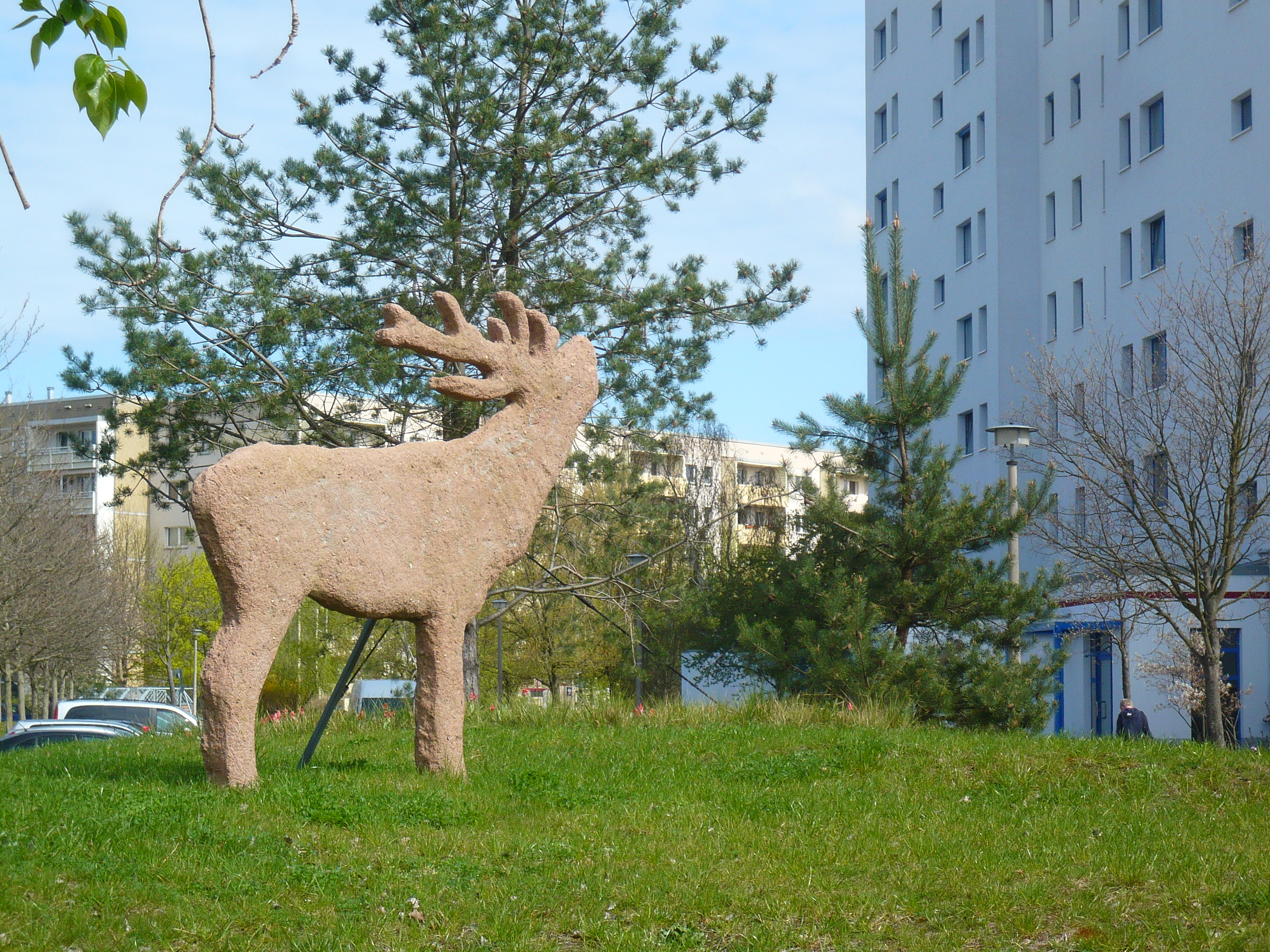 Ortsteil Berlin-Marzahn: Schorfheidestraße